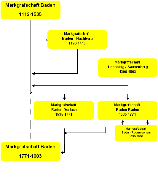 schematische Darstellung der badischen Markgrafschaften 1112-1803